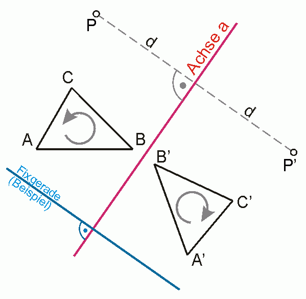 Veranschaulicht die Gesetzmäßigkeiten der Achsensymmetrie